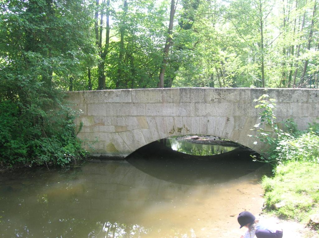 Le Pont Mandrou, enjambant la nouvelle Thève